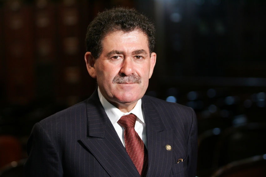 Deputado Paulo Melo no Plenário da ALERJ